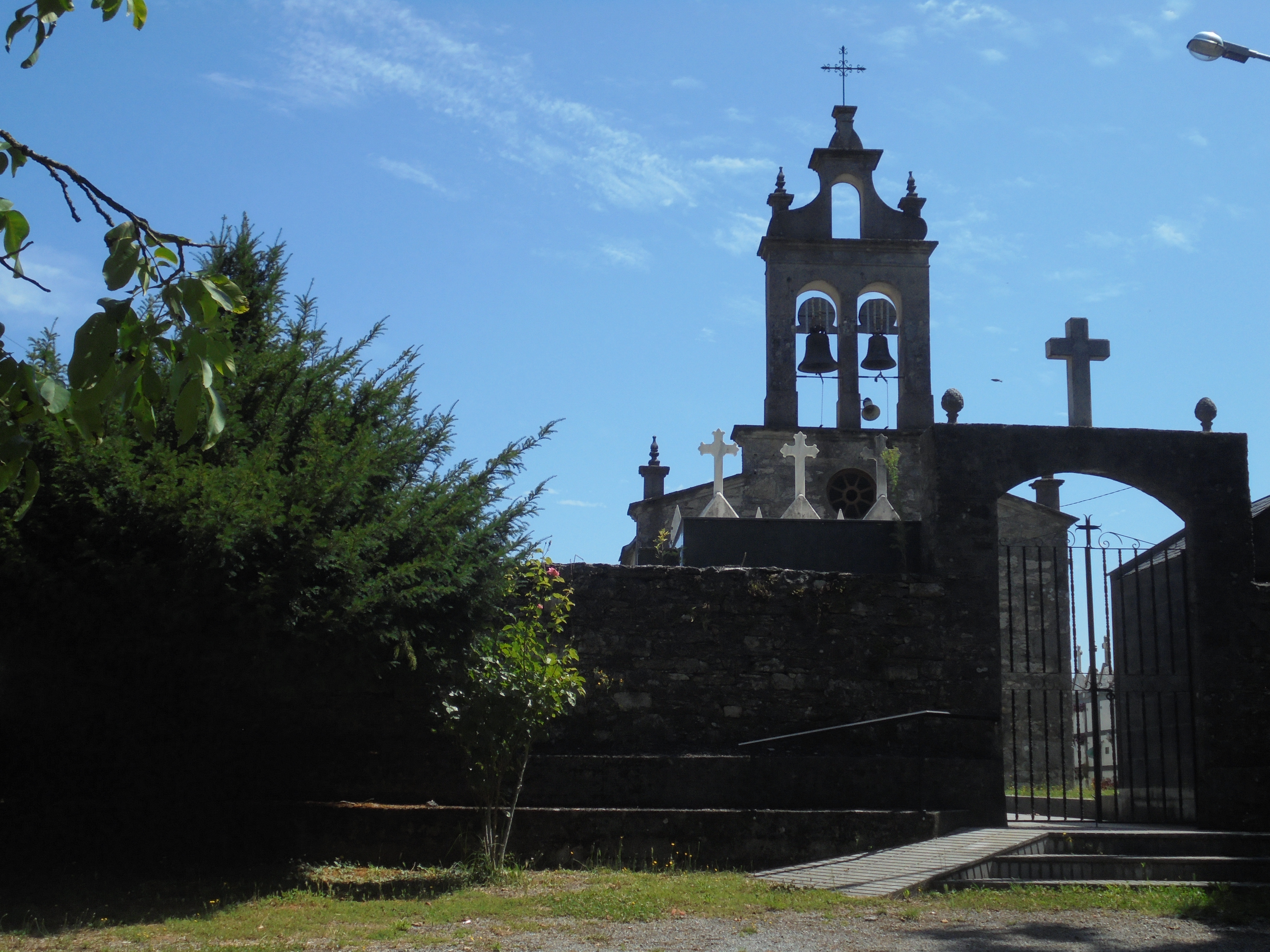 Igrexa de Santiagao de Pousada